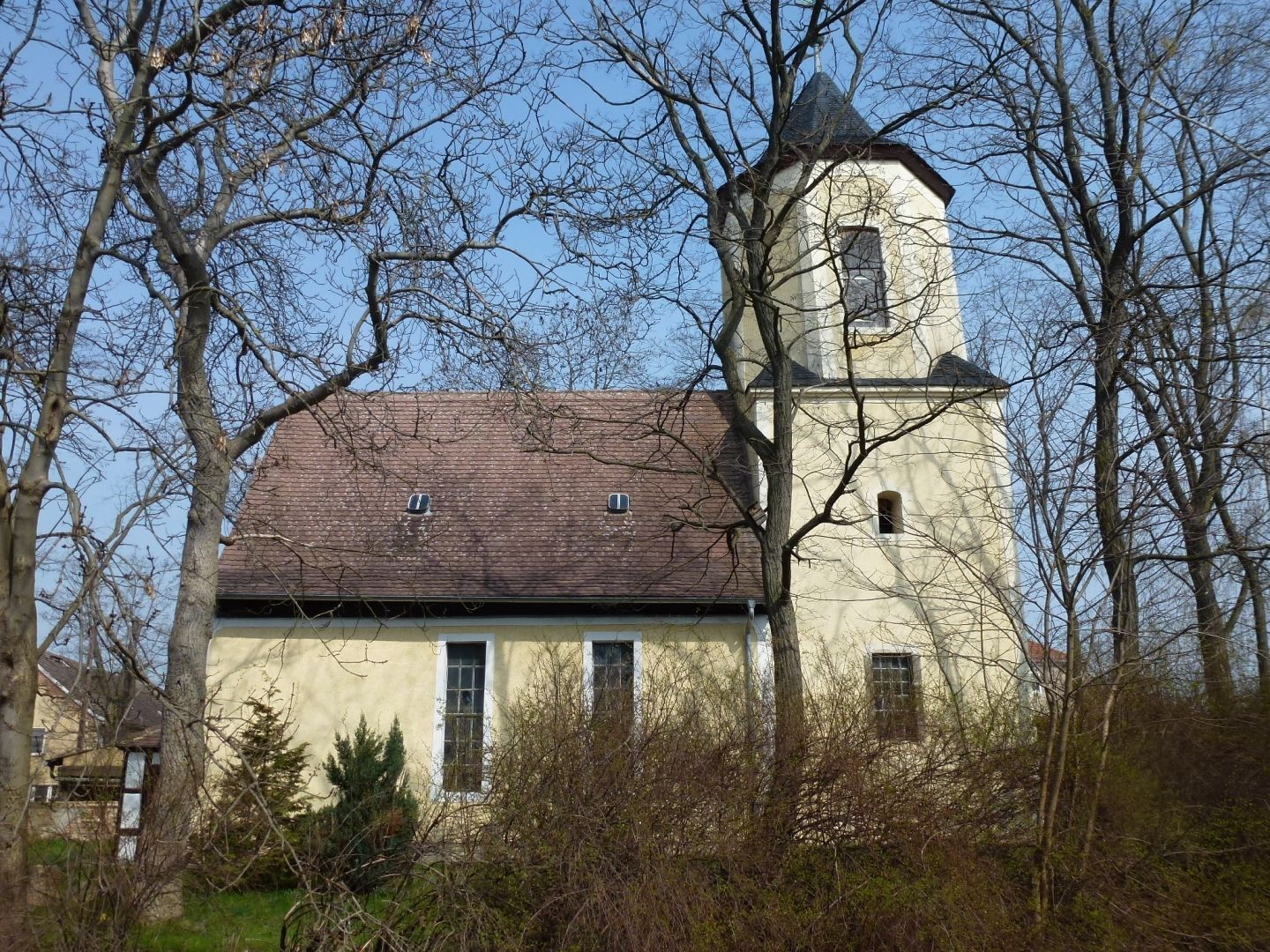 Kirche in Kleinhelmsdorf